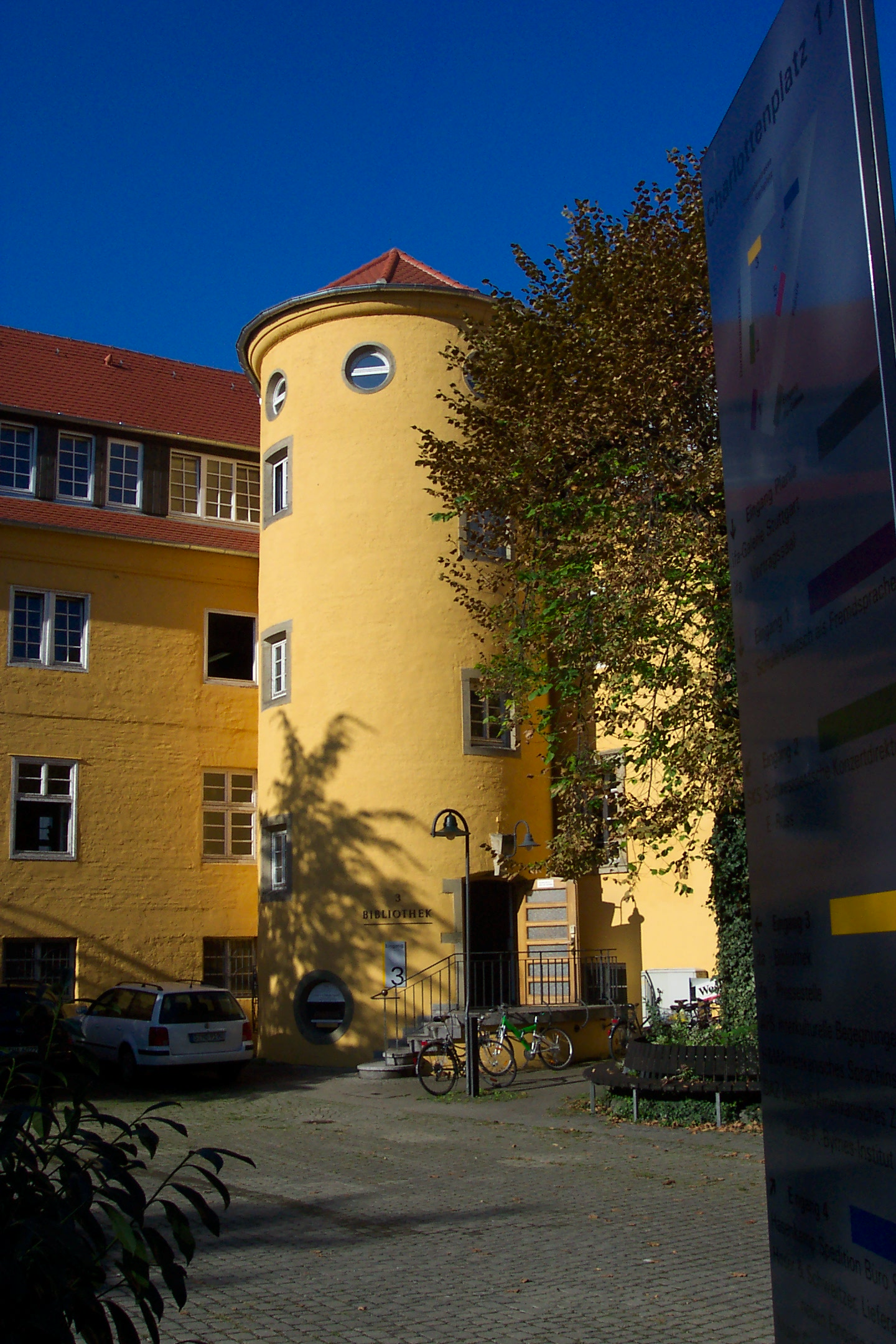 DAZ, Hof